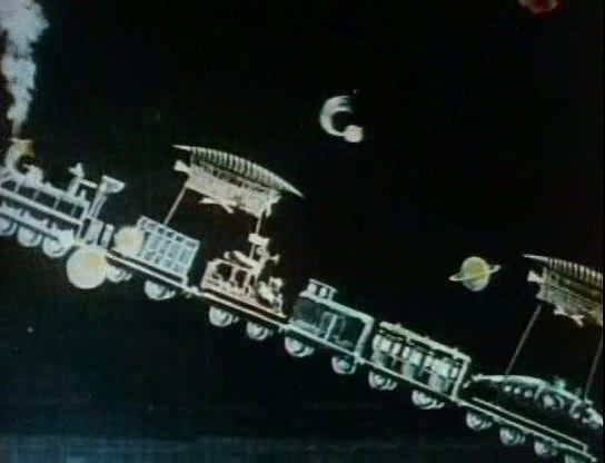 Méliès, Le voyage a travers l'impossible1904 colorizée 18